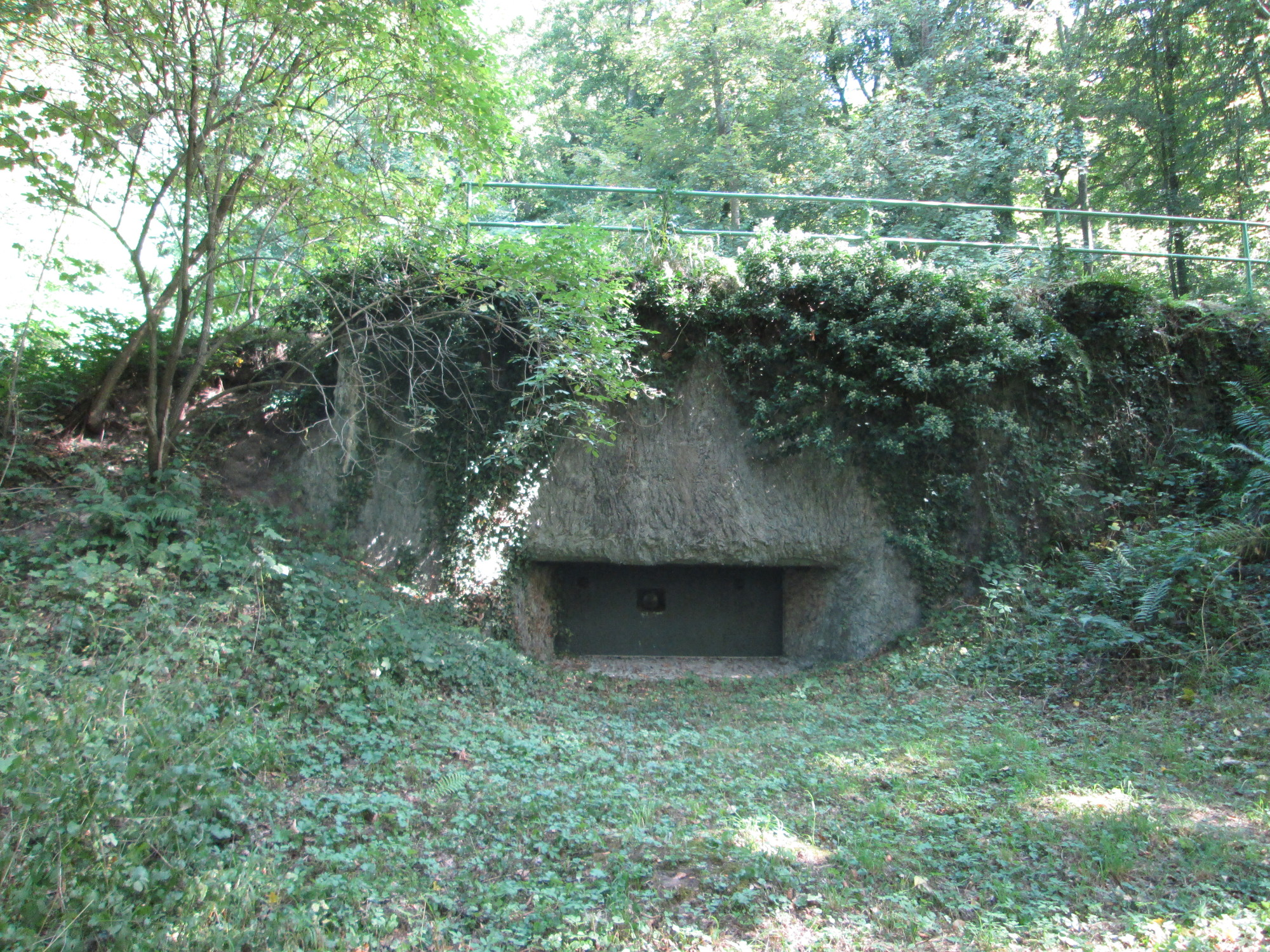 Bunker WH 316 am Halberg in Brebach-Fechingen